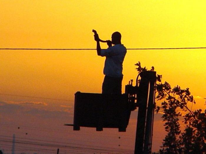 טקס קבלת השנה החדשה מתקיים ב"גן אריאל", הפונה מערבה, בקיבוץ גת.